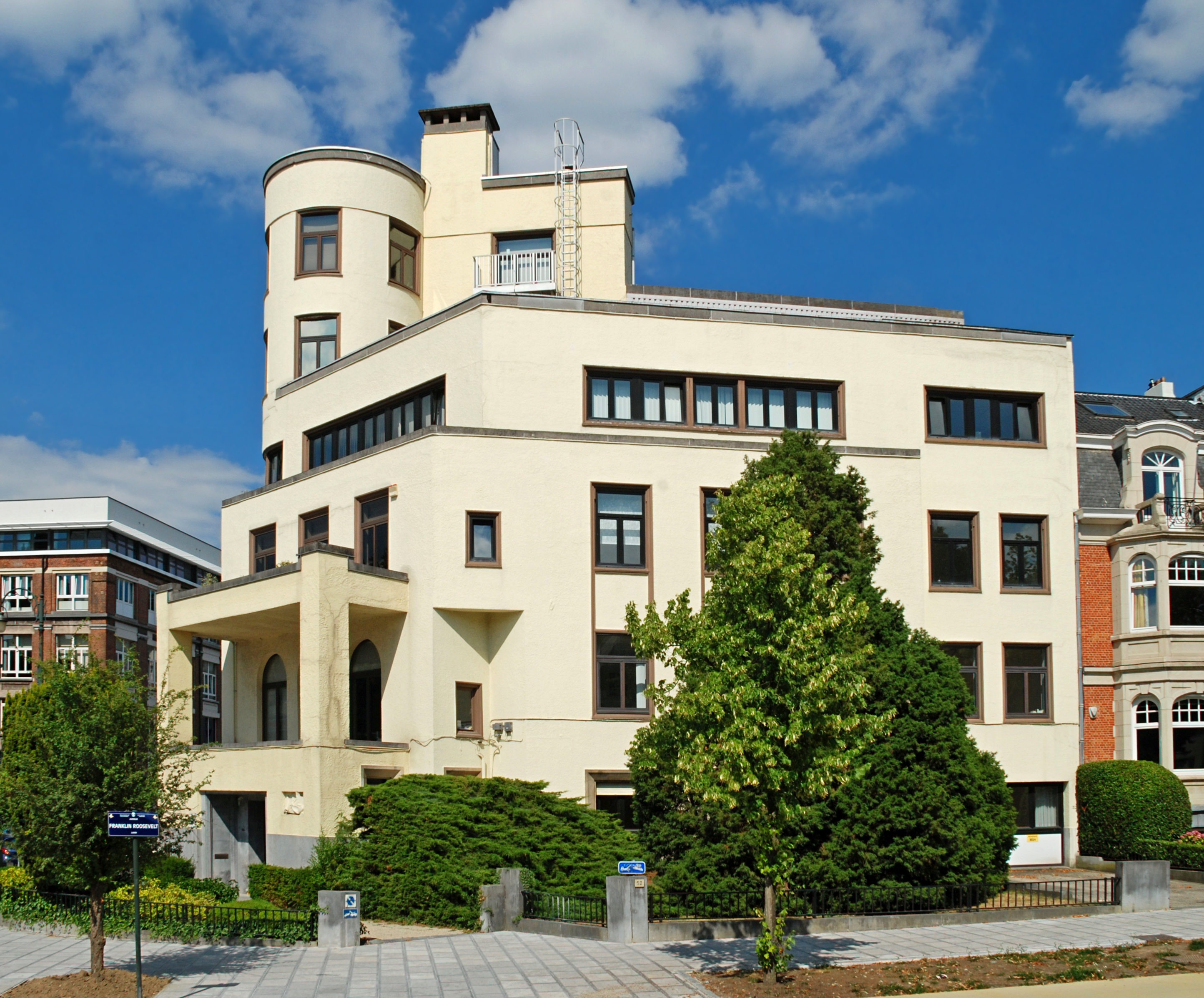 Belgique - Bruxelles - Maison Blomme (modernisme 1928 - architecte Adrien Blomme)